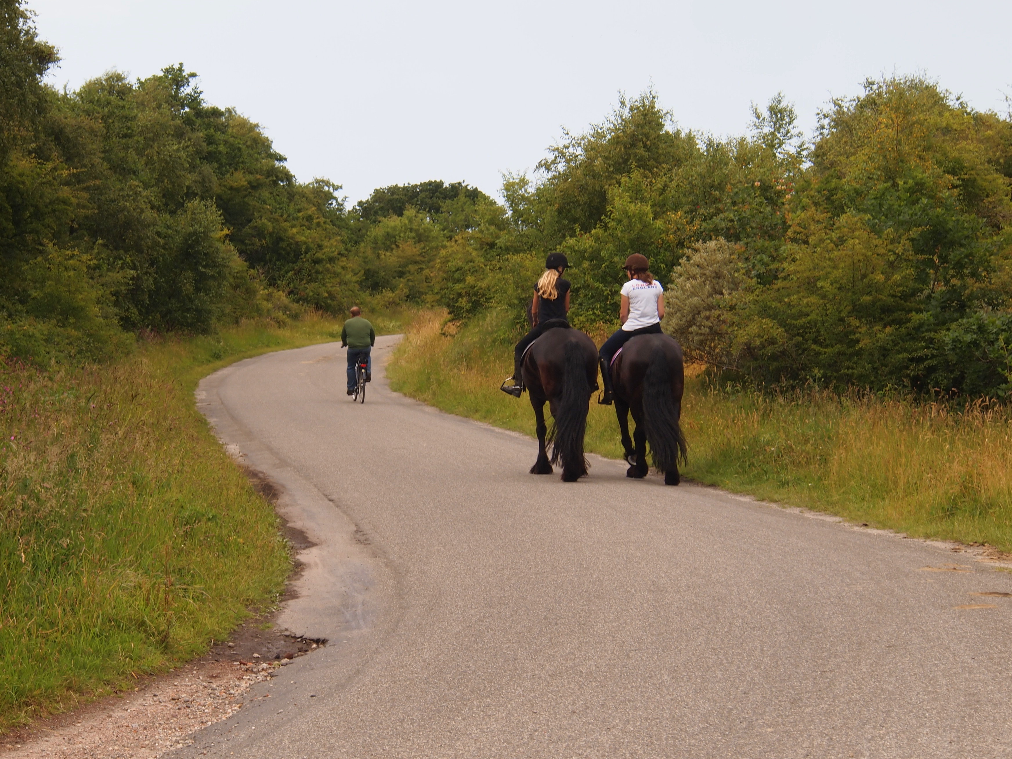 Paardrijden op Schiermonnikoog This is a photo or sound file made in Schiermonnikoog National Park in the Netherlands, with the main subject of the file in the category: humans in nature